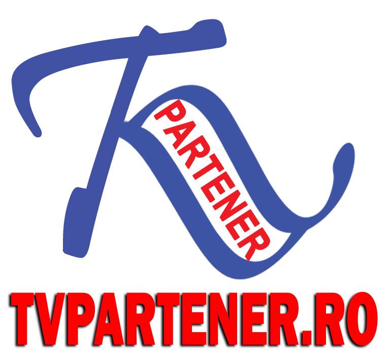 Televiziune online din judeţul Dâmboviţa